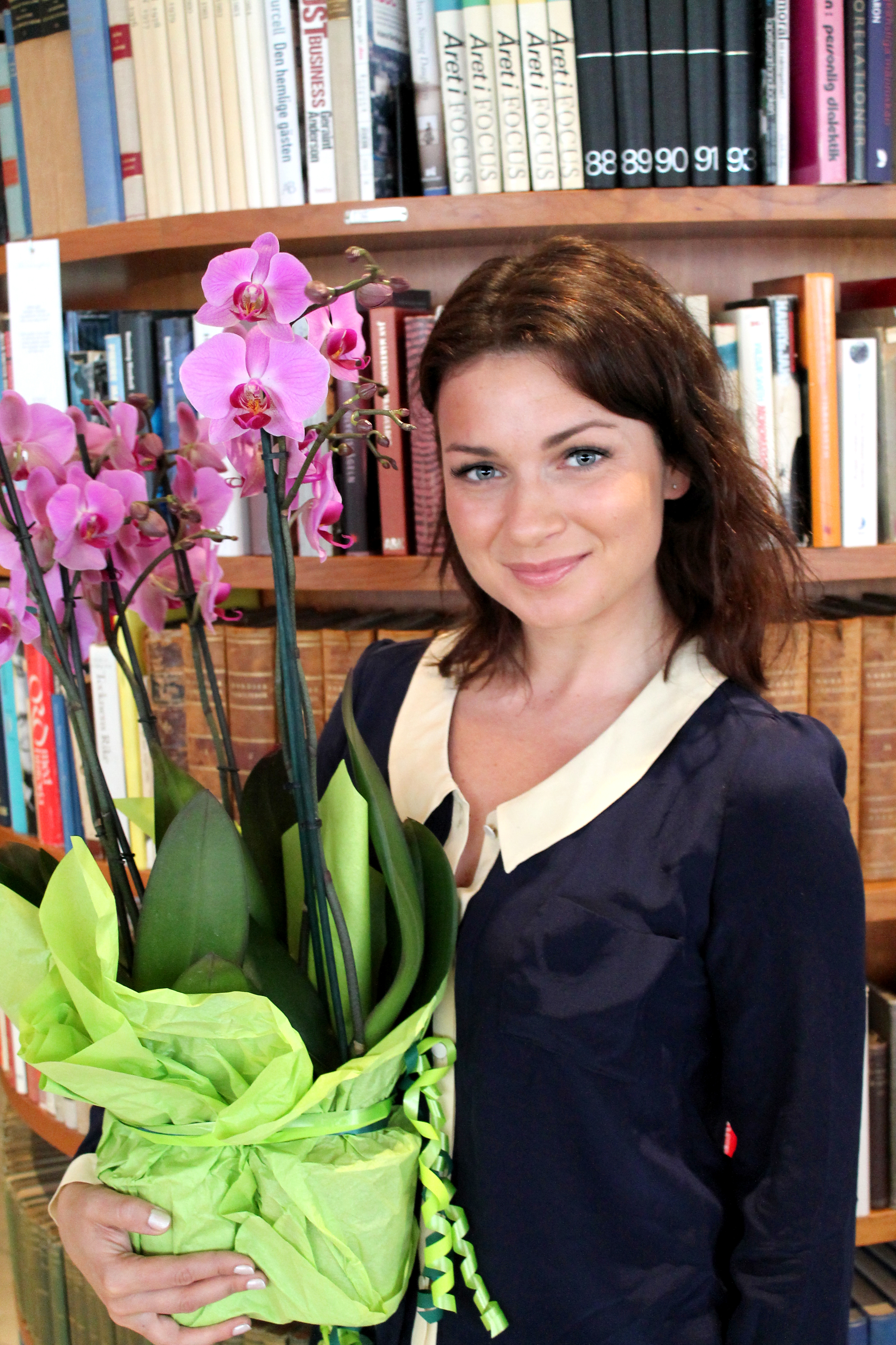 Skådespelerskan Claudia Galli Concha.